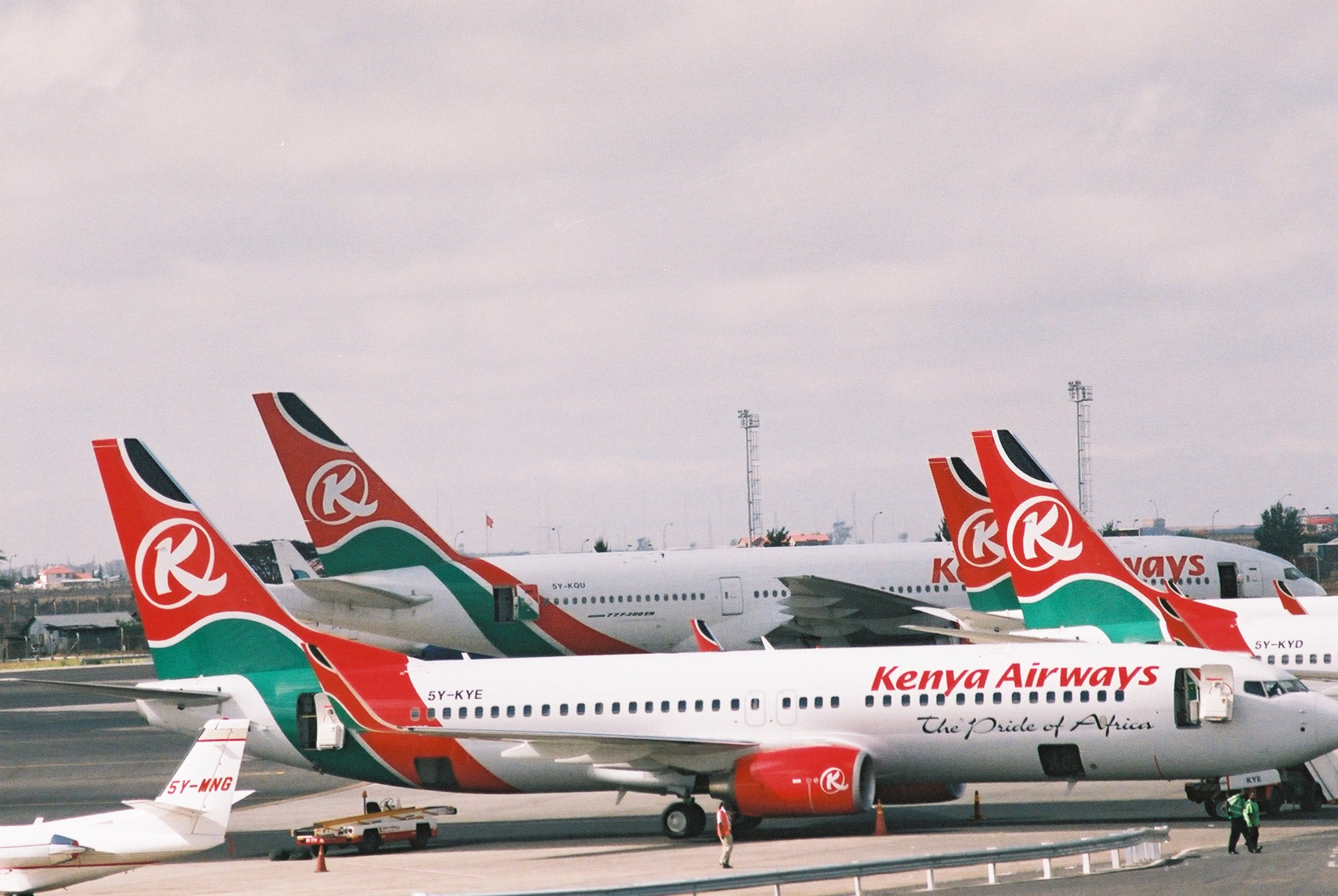 5Y-KQU Boeing 777-2U8/ER (cn 33681/479) Kenya Airways. Nairobi - Jomo Kenyatta (Embakasi) (NBO / HKJK) Kenya, April 2009.